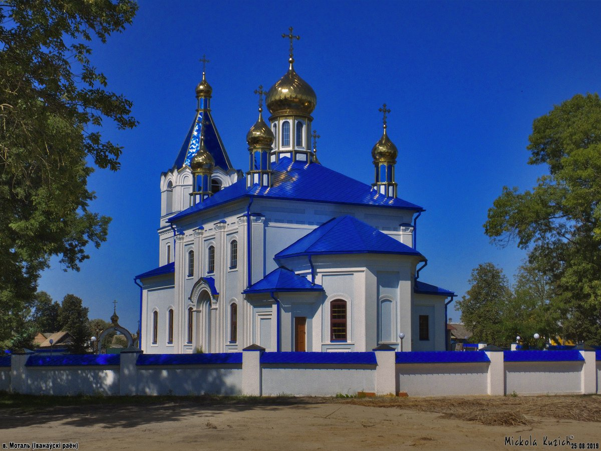 Спаса-Праабражэнская царква ў Моталі Іванаўскага раёна Брэсцкай вобласці Беларусі